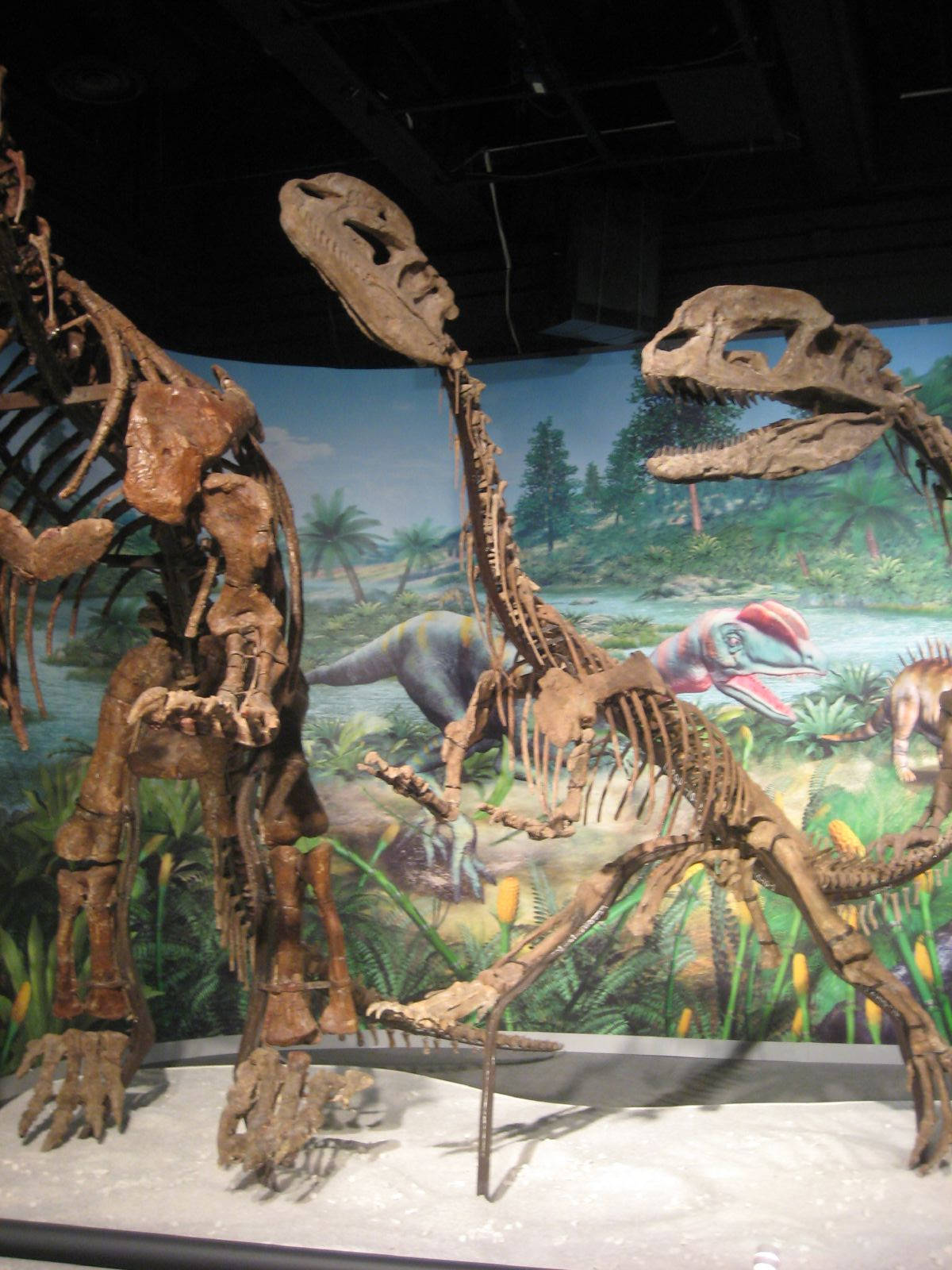 Dilophosaurus sinensis mounts